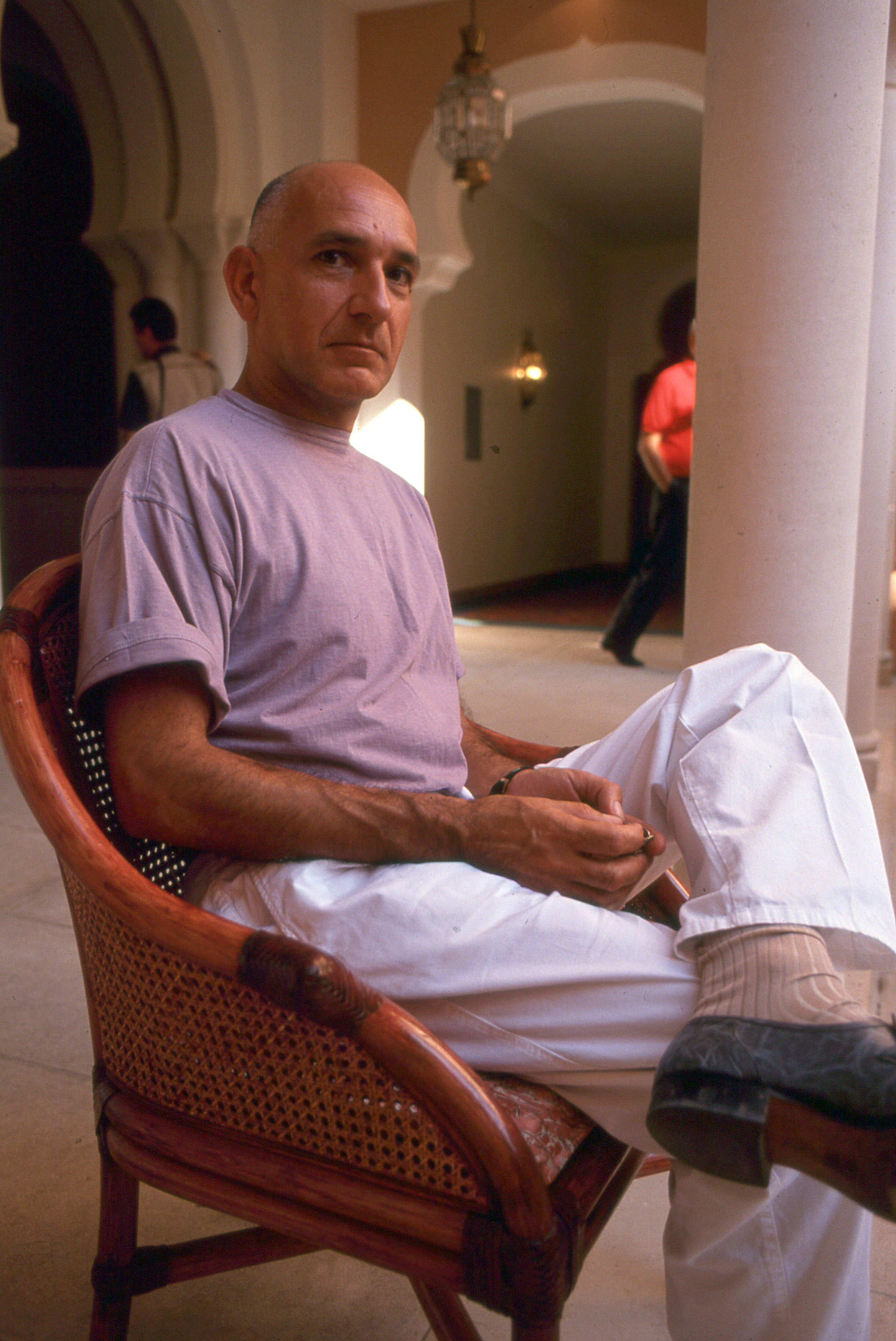 L'attore Ben Kingsley alla Mostra del cinema di Venezia del 1990